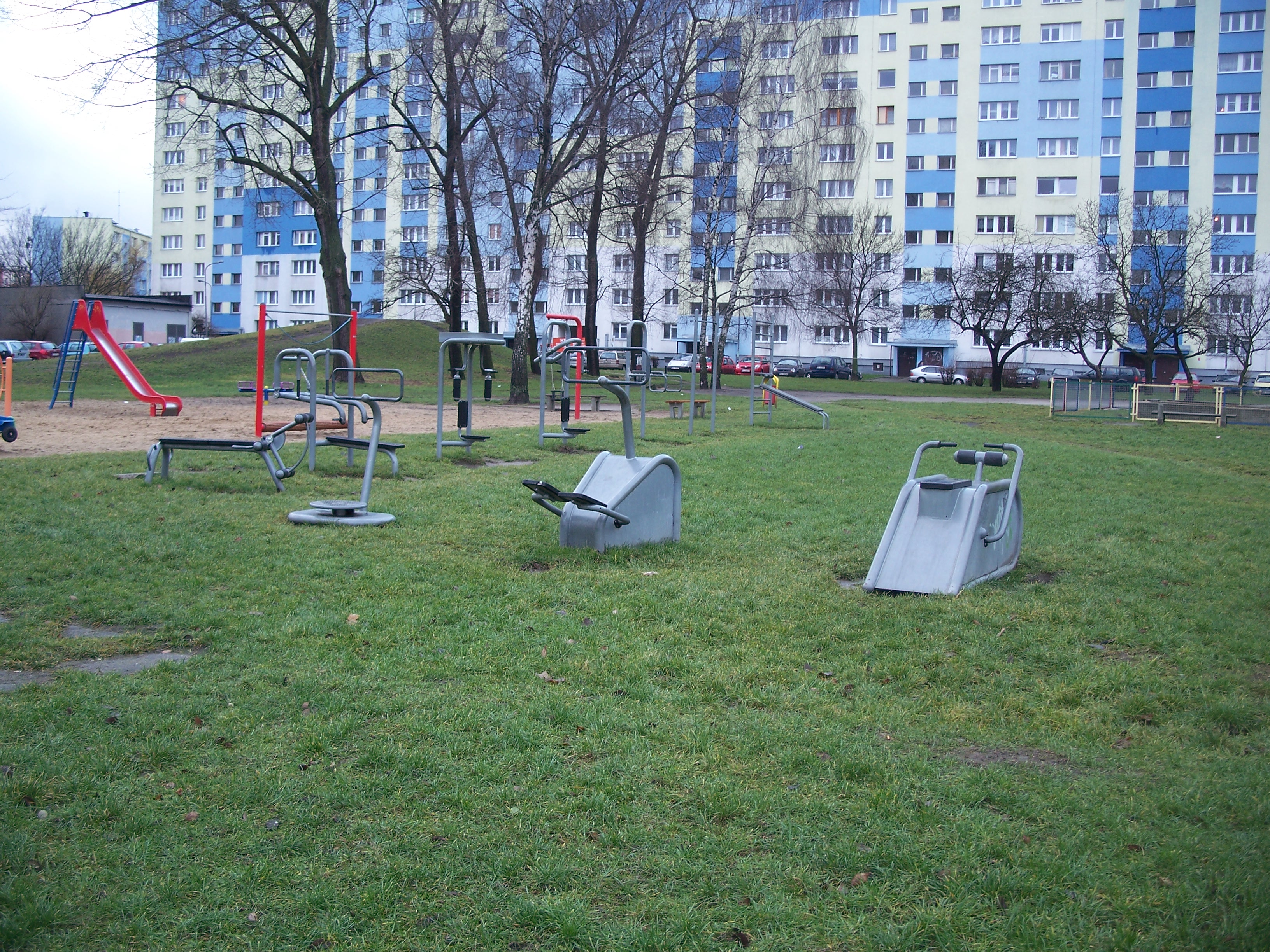 Osiedle Retkinia-Zagrodniki w Łodzi - siłownia